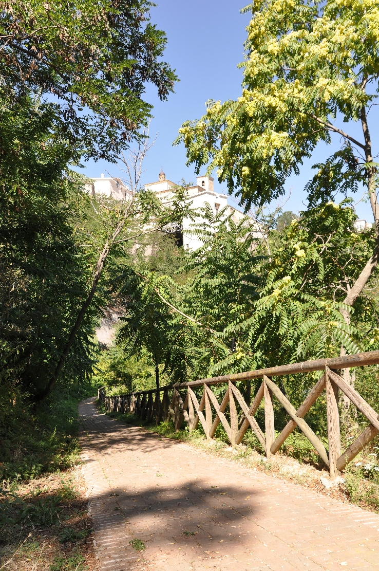 Penne (comune, Italy) 2012